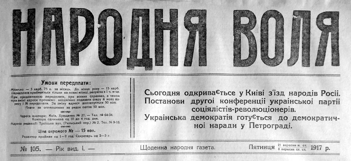 Газета «Народня воля» за 08.09.1917 року